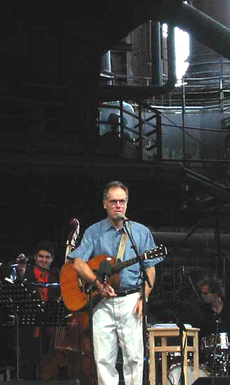 Loudon Wainwright III bei Century of Song in Duisburg am 13. Juli 2003 Summary Andere Versionen: Urheber: Piet J. Munstermann Benutzer:Popp - Wünsche, Kritik, Lob?